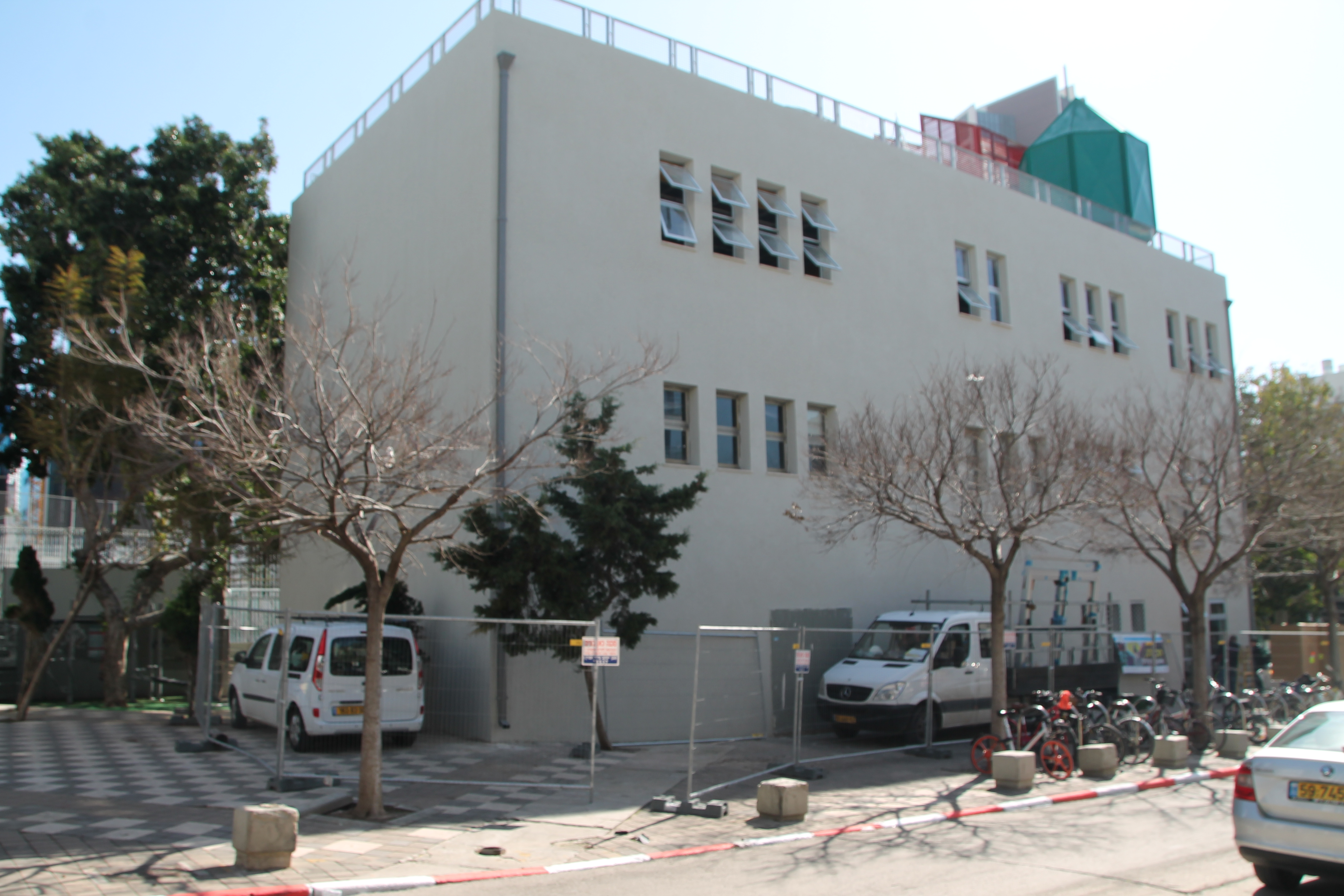 בית הספר לאמנות קלישר מבנה 1